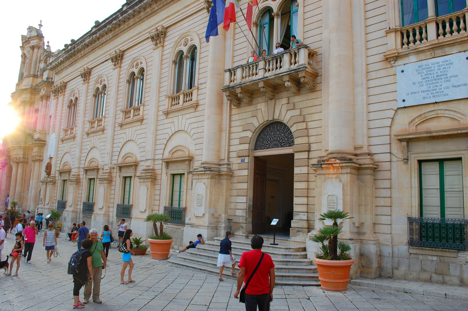 Vista esterna del palazzo Municipale di Scicli (Ragusa). This is a photo of a monument which is part of cultural heritage of Italy.